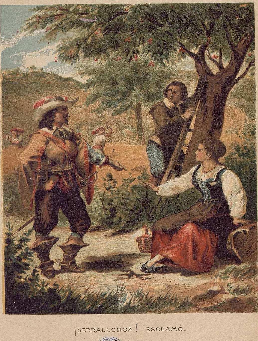 Ilustración de Rafael del Castillo, Los bandidos célebres españoles episodios históricos referentes a los más famosos bandidos / reunidos por Álvaro Carrillo e ilustrados con cromos de reputados artistas, Barcelona, Jaime Seix editor, 1892. T. II, p. 866, ¡Serrallonga! Esclamó